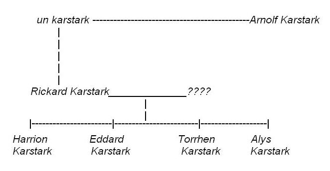 arbol geenalogico ficticio